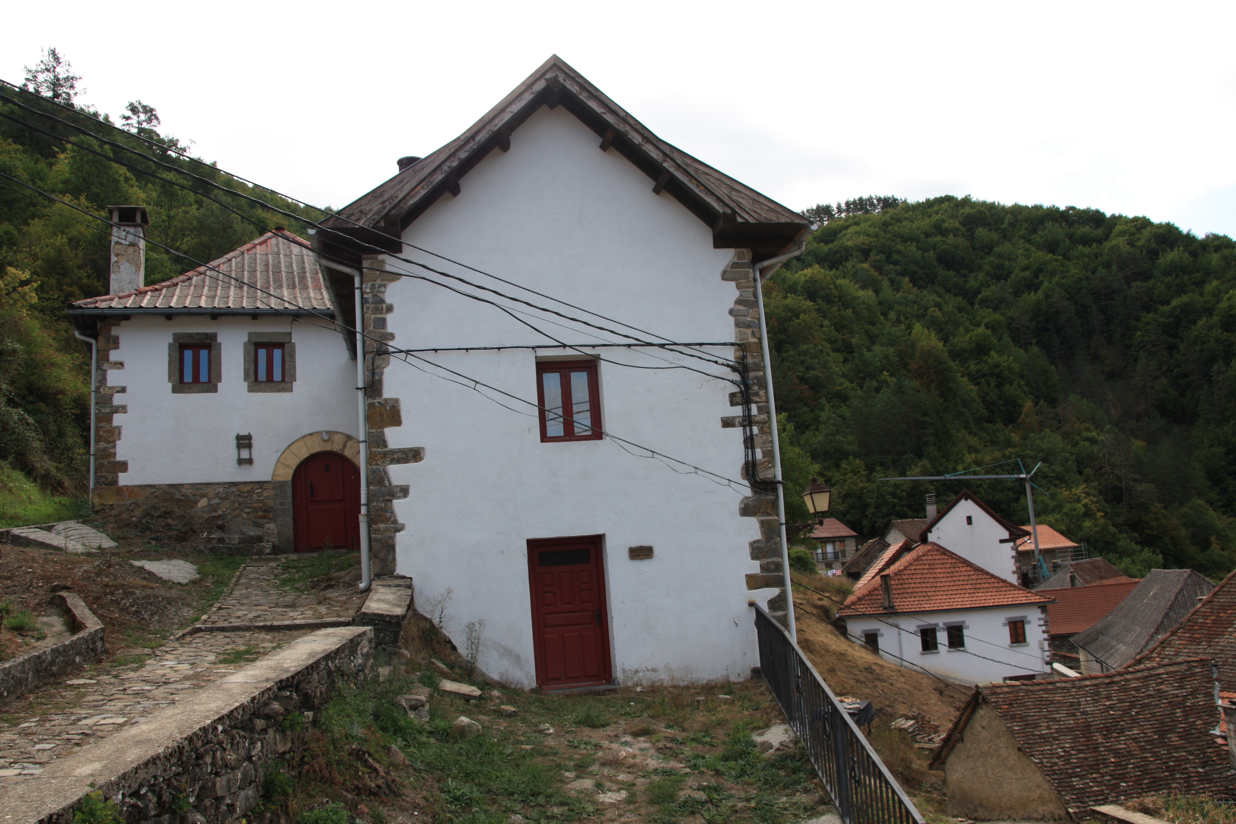 Club Vasco de Camping elkartearen aterpea.